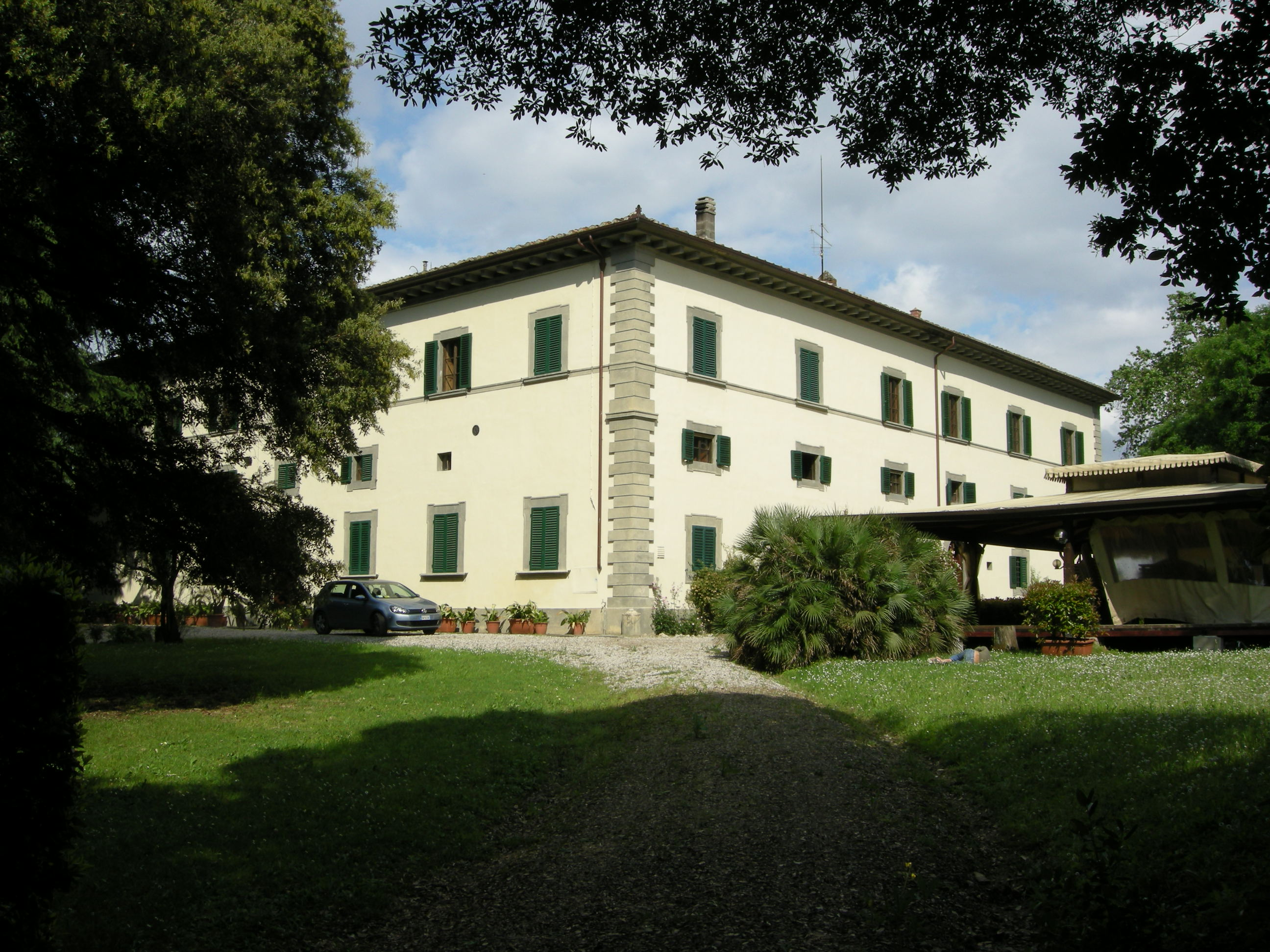 Villa la costaglia, ingresso